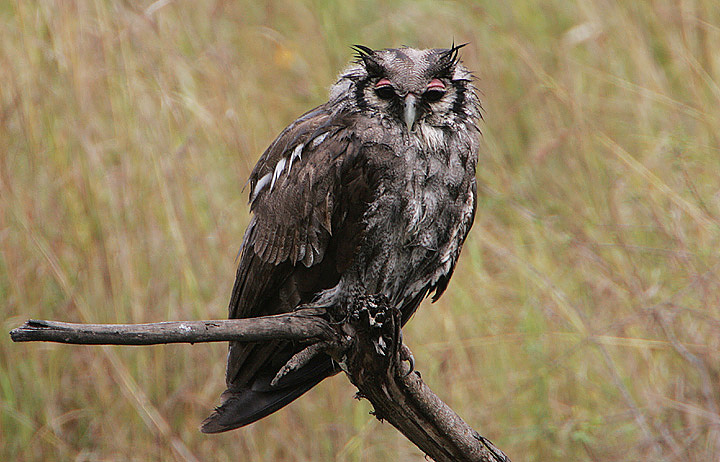 Image taken in a rainstorm in the Masai-Mara, Kenya.